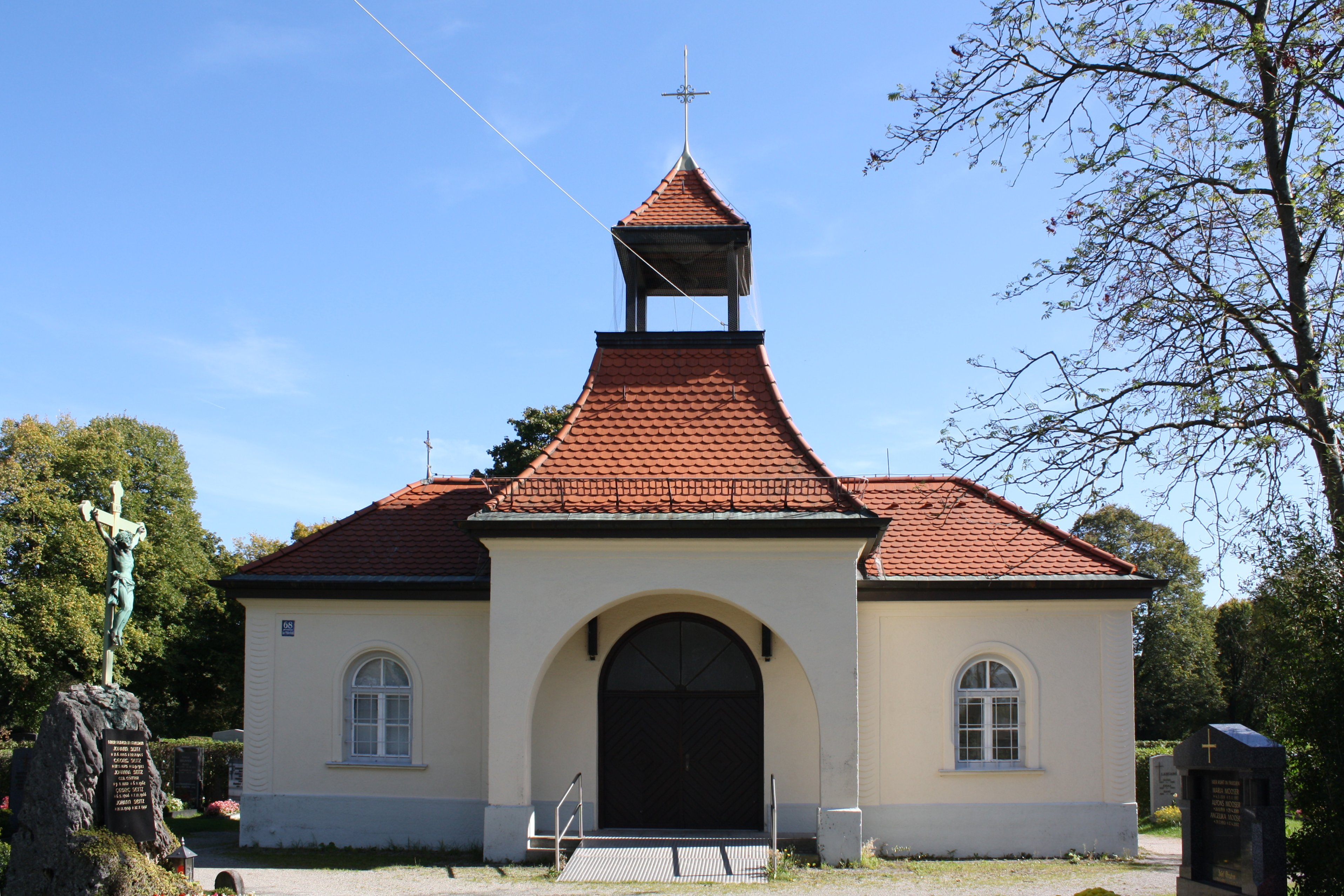 Leichenhaus Friedhof Riem, Am Mitterfeld 68, München